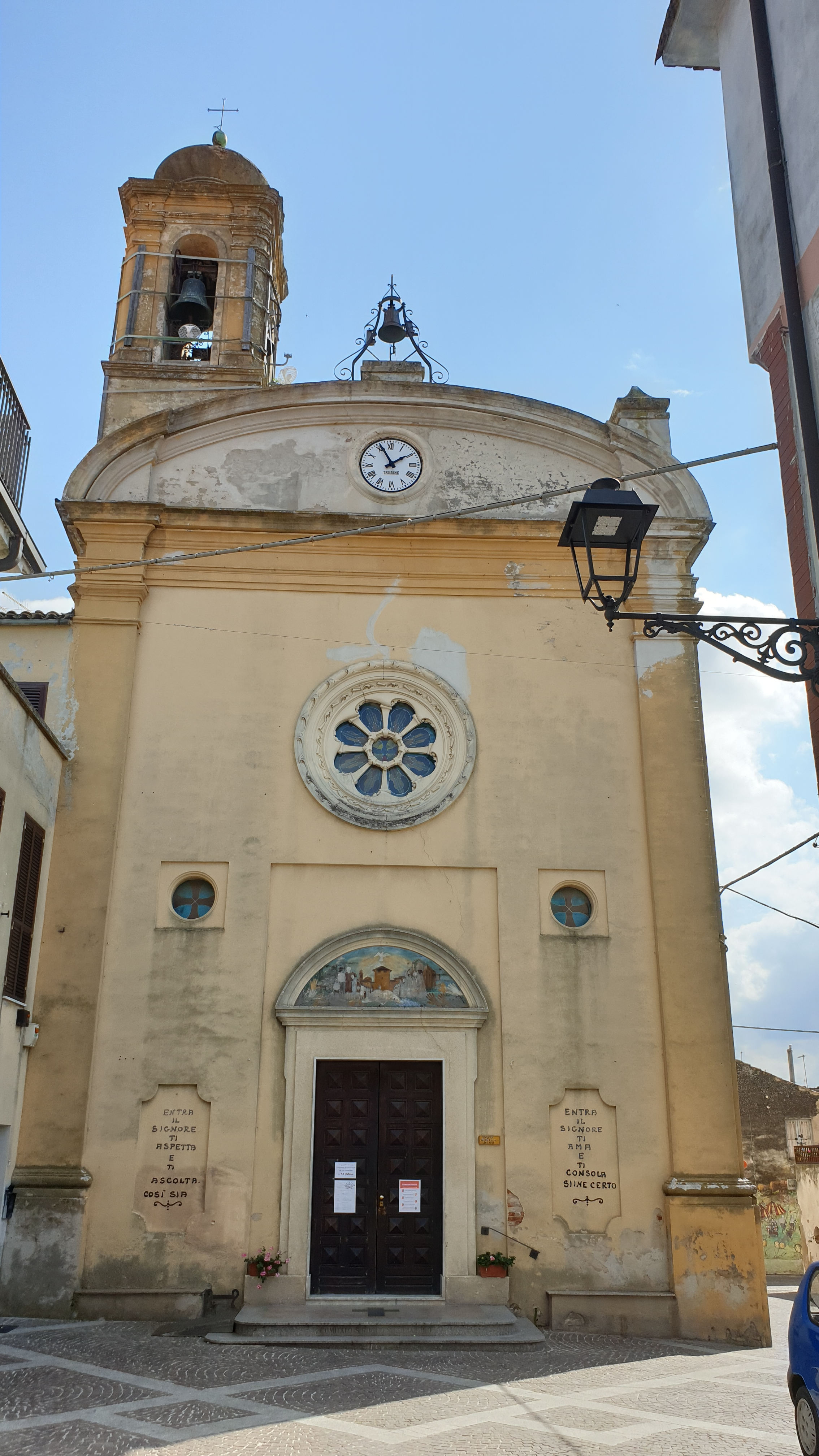 Cepagatti - Chiesa di Santa Lucia